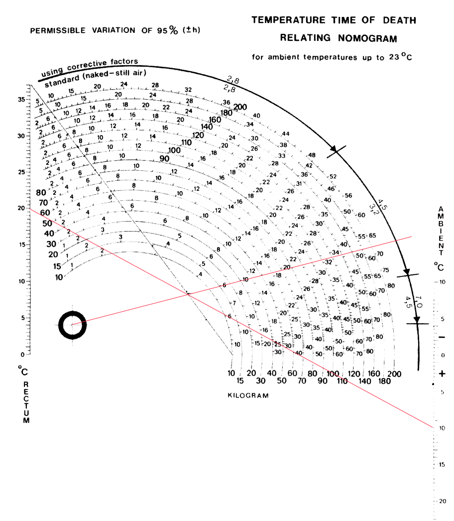 Nomogramme de Henssge. Nomogramme inventé par le docteur Hengsse et donnant, en fonction de la température du corps, de la température extérieure et de la masse corporelle, le délai écoulé entre la mort et la mesure. Exemple d'utilisation : Cadavre de 80 kg dont la température interne est de 20° alors que la température extérieure est de 10° On trace un trait reliant la température interne de 20 °(à gauche) et la température ambiante de 10° (à droite). Ce trait coupe la droite diagonale en un point. On trace alors une seconde droite partant du centre de la cible et passant par le point précédent. Sur l'arc de cercle correspondant à une masse corporelle de 80 kg, on lit un délai post-mortem de 20h. Sur l'arc le plus extérieur, on lit que l'intervalle de confiance à 95% est de +/- 3,2h (sans facteur correctif) ou 4,5h (si facteur correctif). Cela signifie qu'un corps nu, de 80kg dans un air calme de 10° dont la température interne est de 20° est mort entre 16,8h et 23,2h plus tôt. Référence: Precision of estimating the time of death by mathematical expression of rectal body cooling C. Henssge (1979)